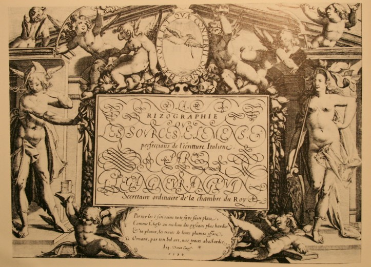 Titre de la Rizographie de Legangneur (1599)